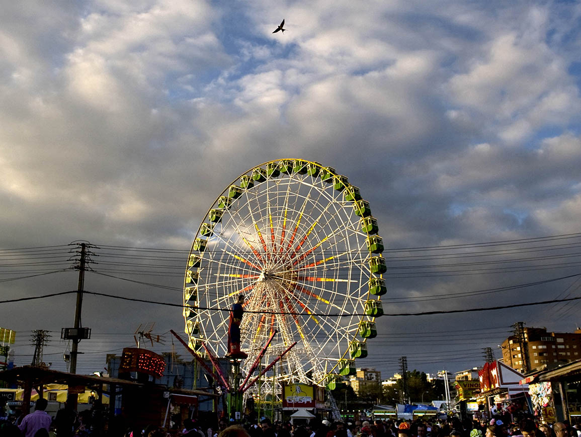 Vista de la denominada calle del infierno. Feria de Sevilla 2009